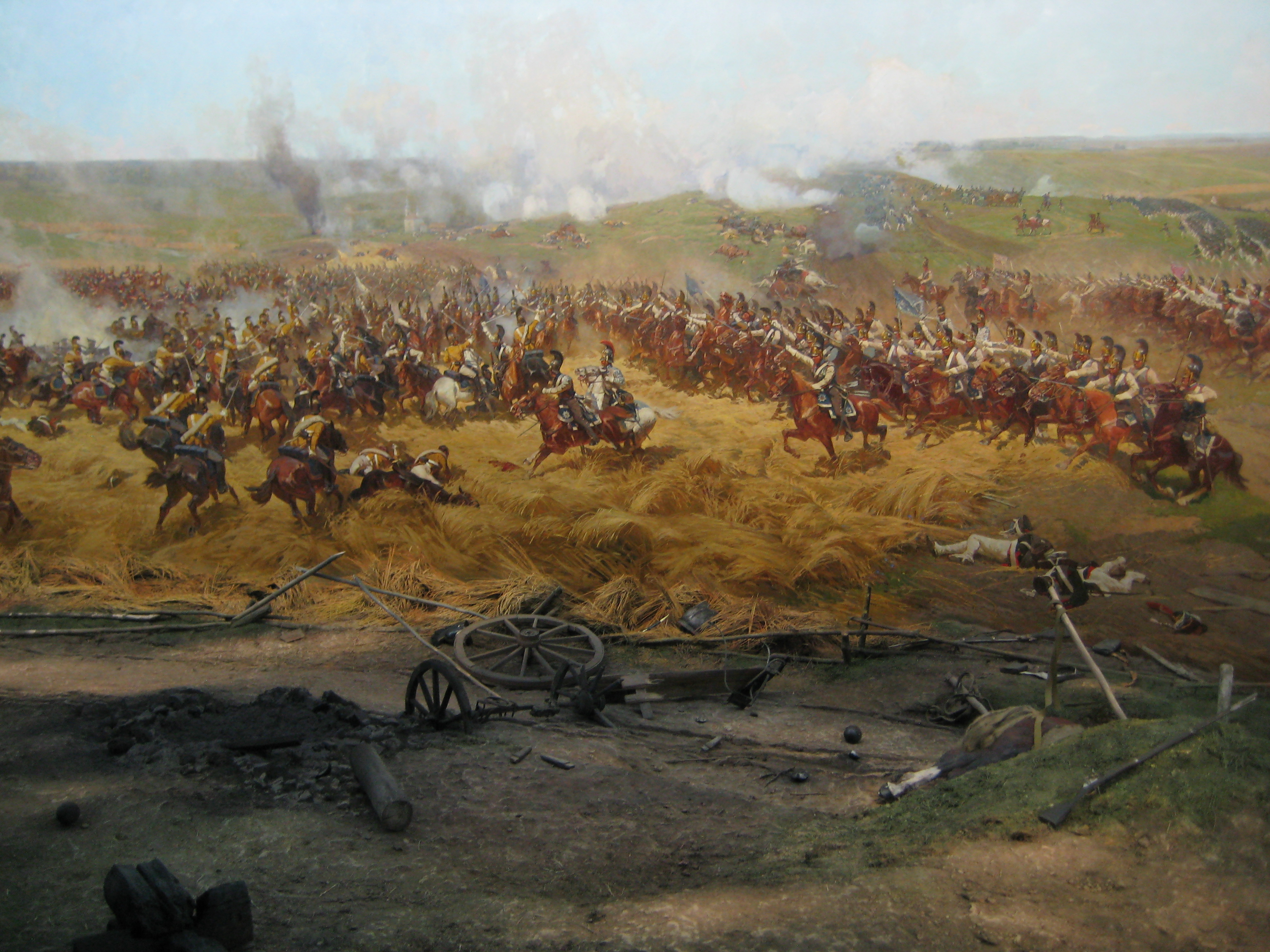 Музей "Бородинская панорама". Вид панорамы